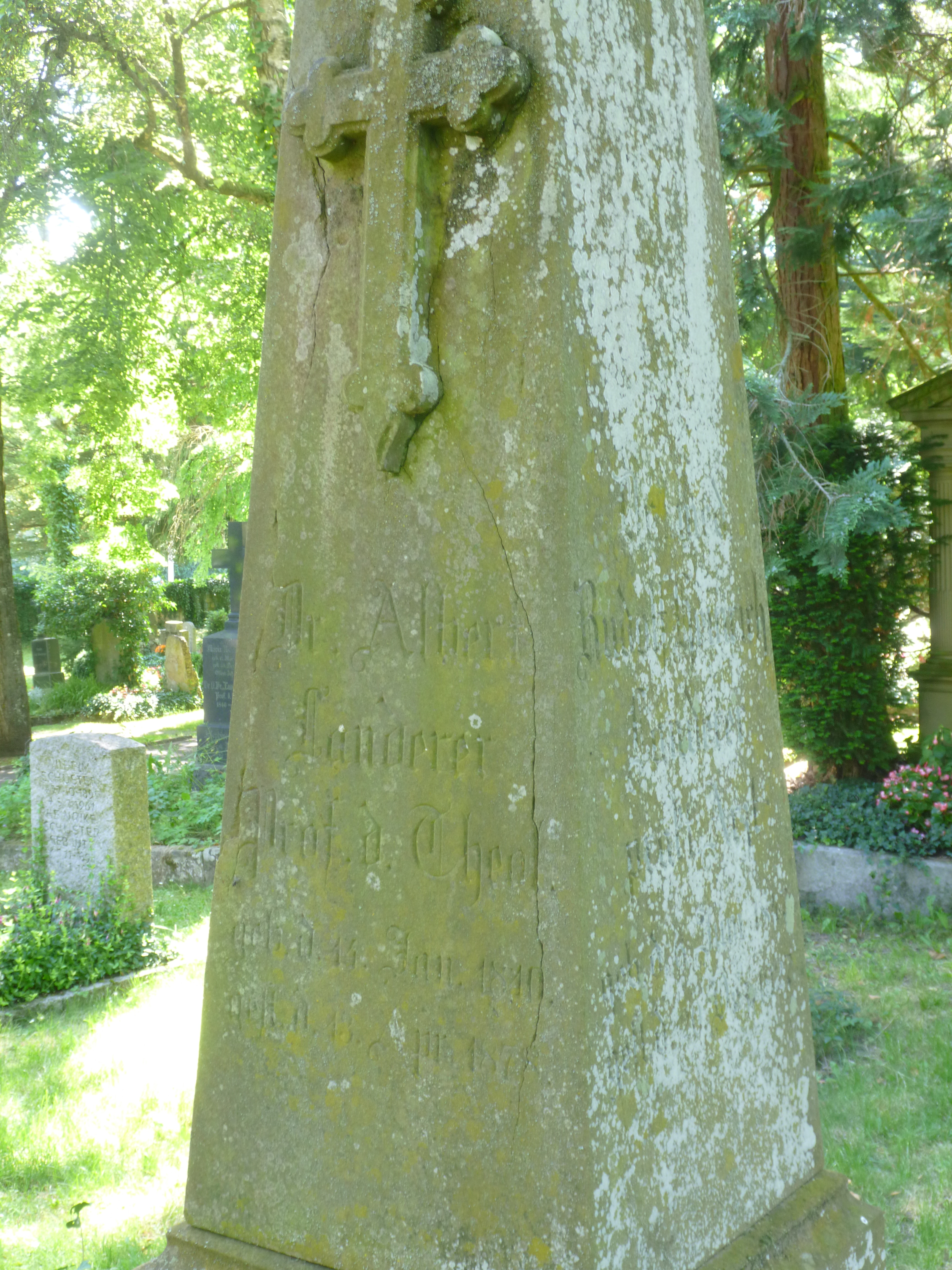 Grab von Maximilian Albert Landerer auf dem Stadtfriedhof Tübingen